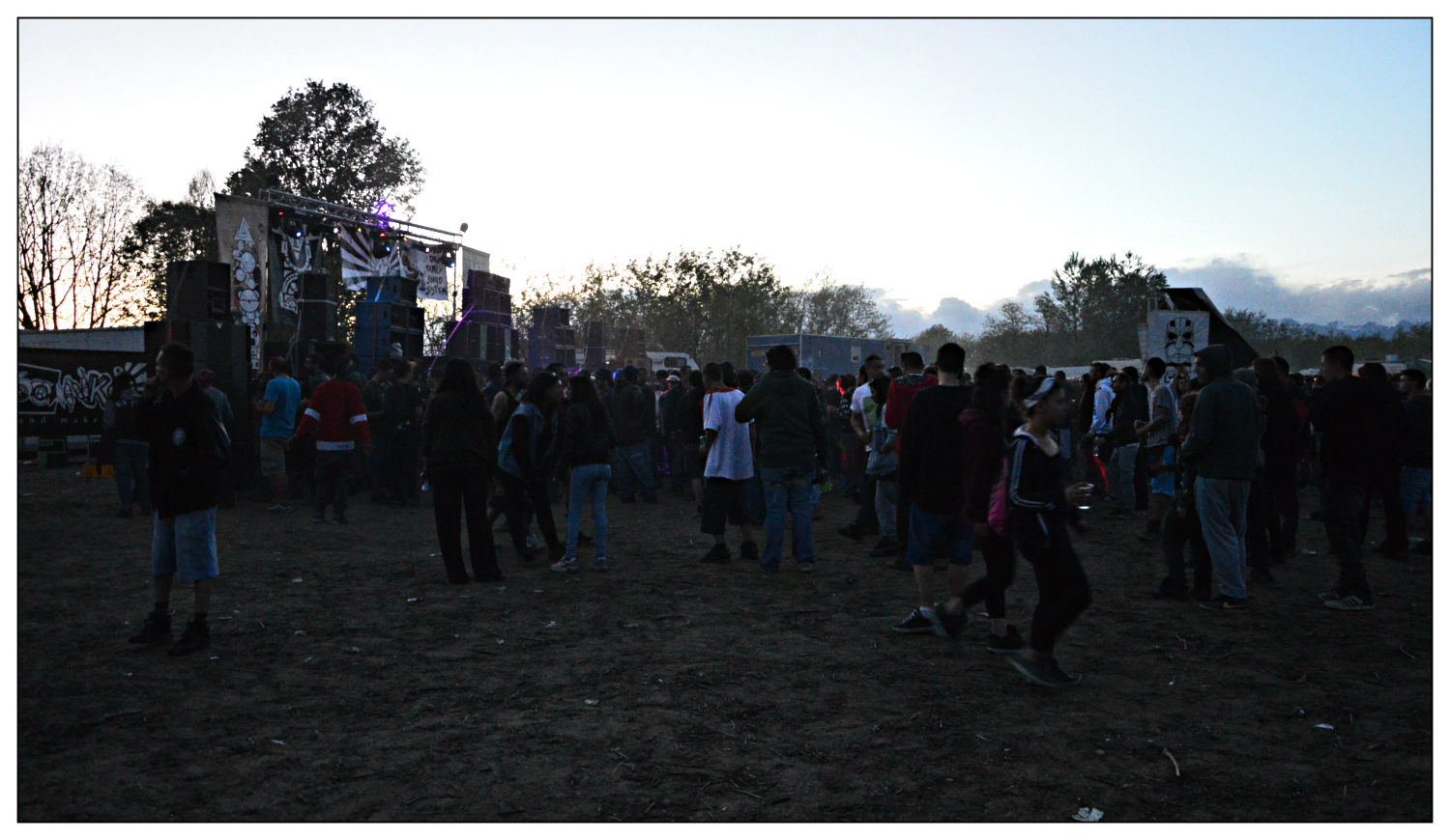 Free Party north Italy